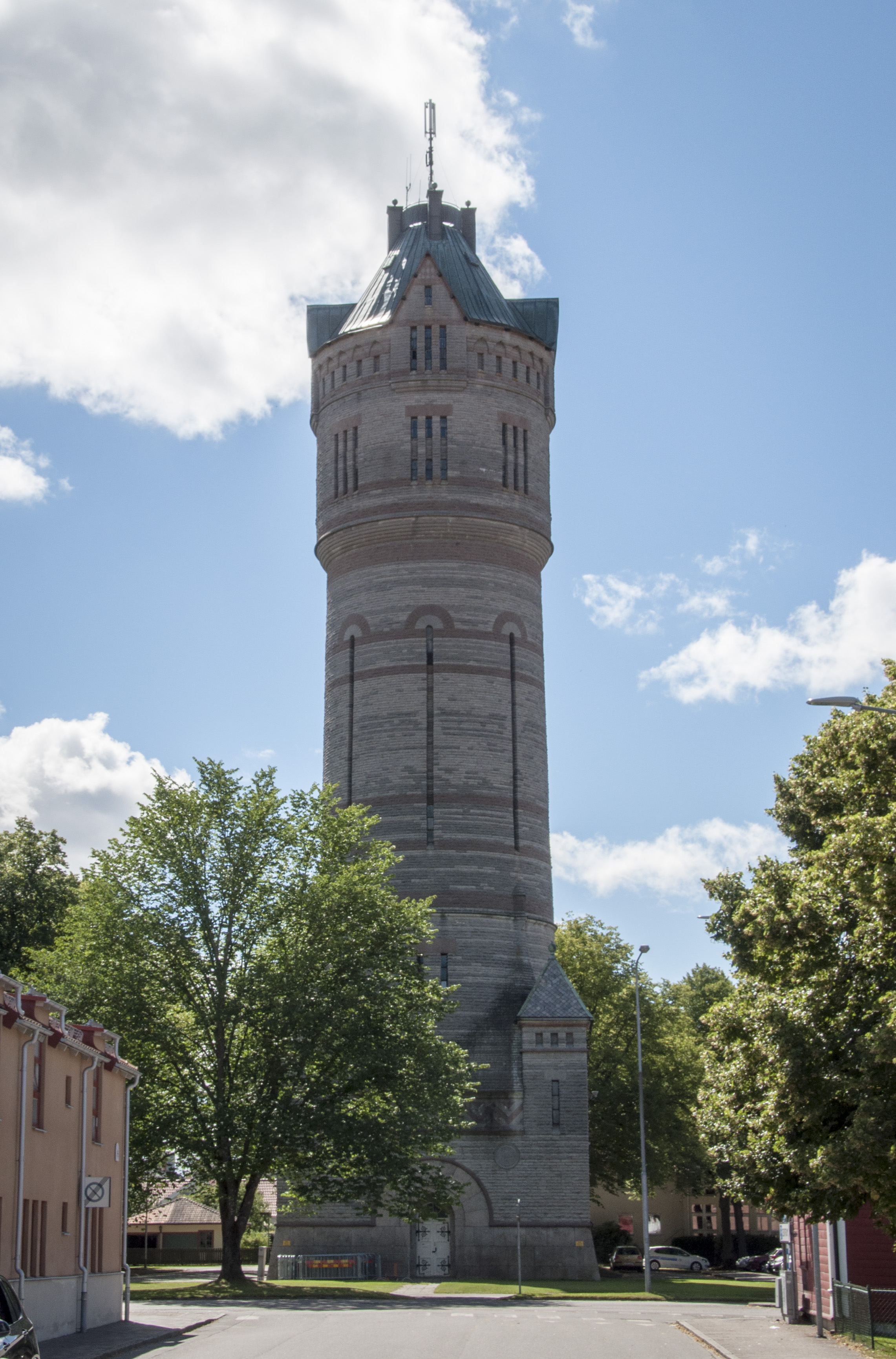 Gamla vattentornet i Lidköping. Uppfört 1899-1902 enligt Ernst Torulfs ritningar i Kunnekullekalksten från Råbäcks stenhuggeri.